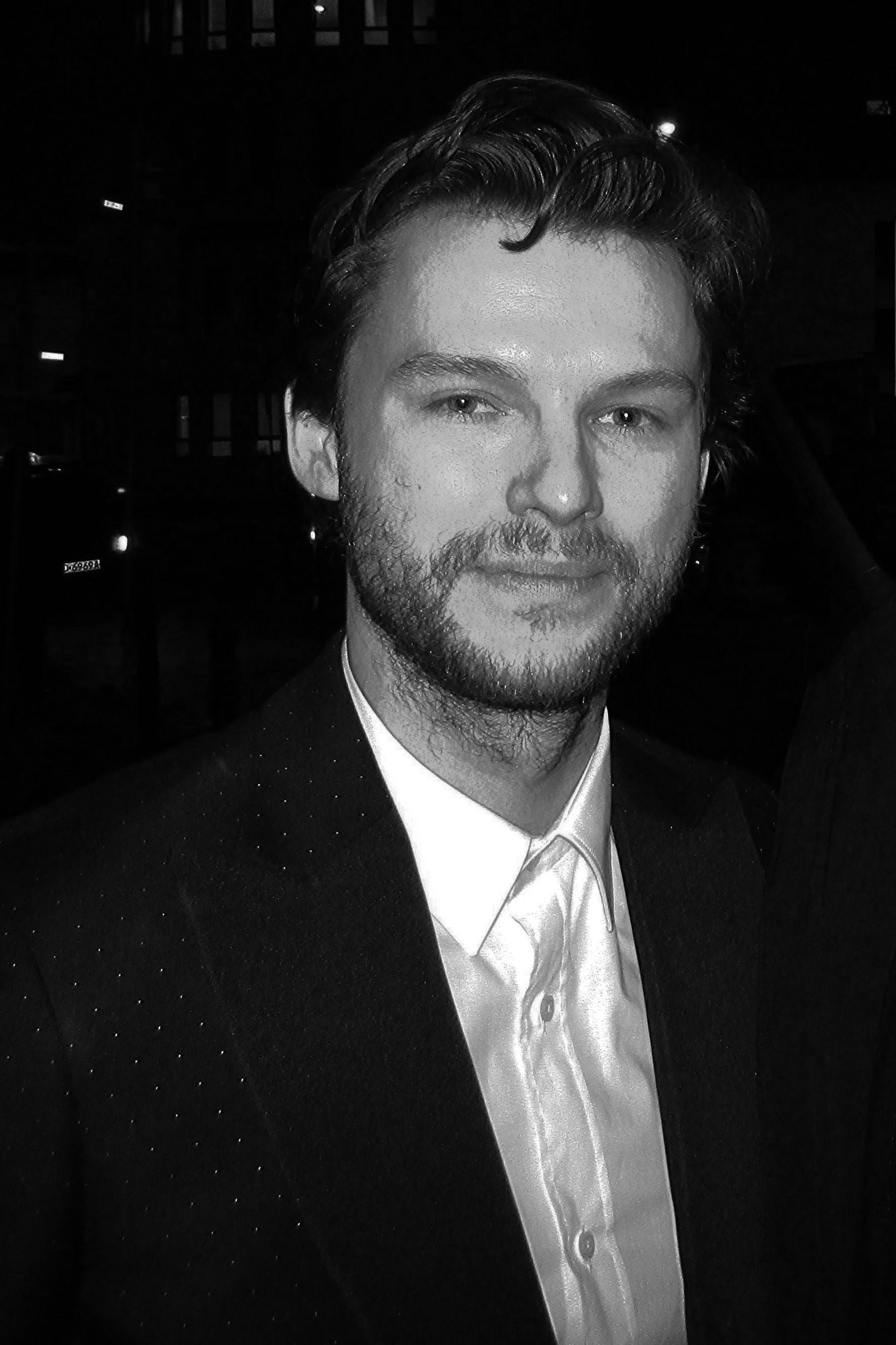 Mateusz Kościukiewicz, aktor.